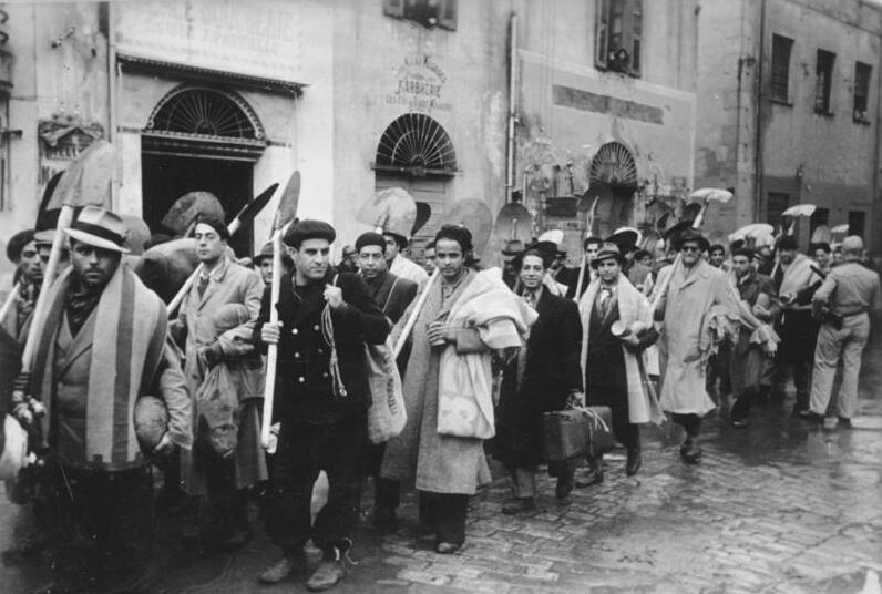 Tunis, Arbeitseinsatz von Juden Afrika: Juden müssen arbeiten.- Ohne Ausnahme werden alle männlichen Juden von Tunis zur Arbeitsleistung herangezogen. PK-Aufnahme: Kriegsberichter Lüken Dezember 1942 241-43